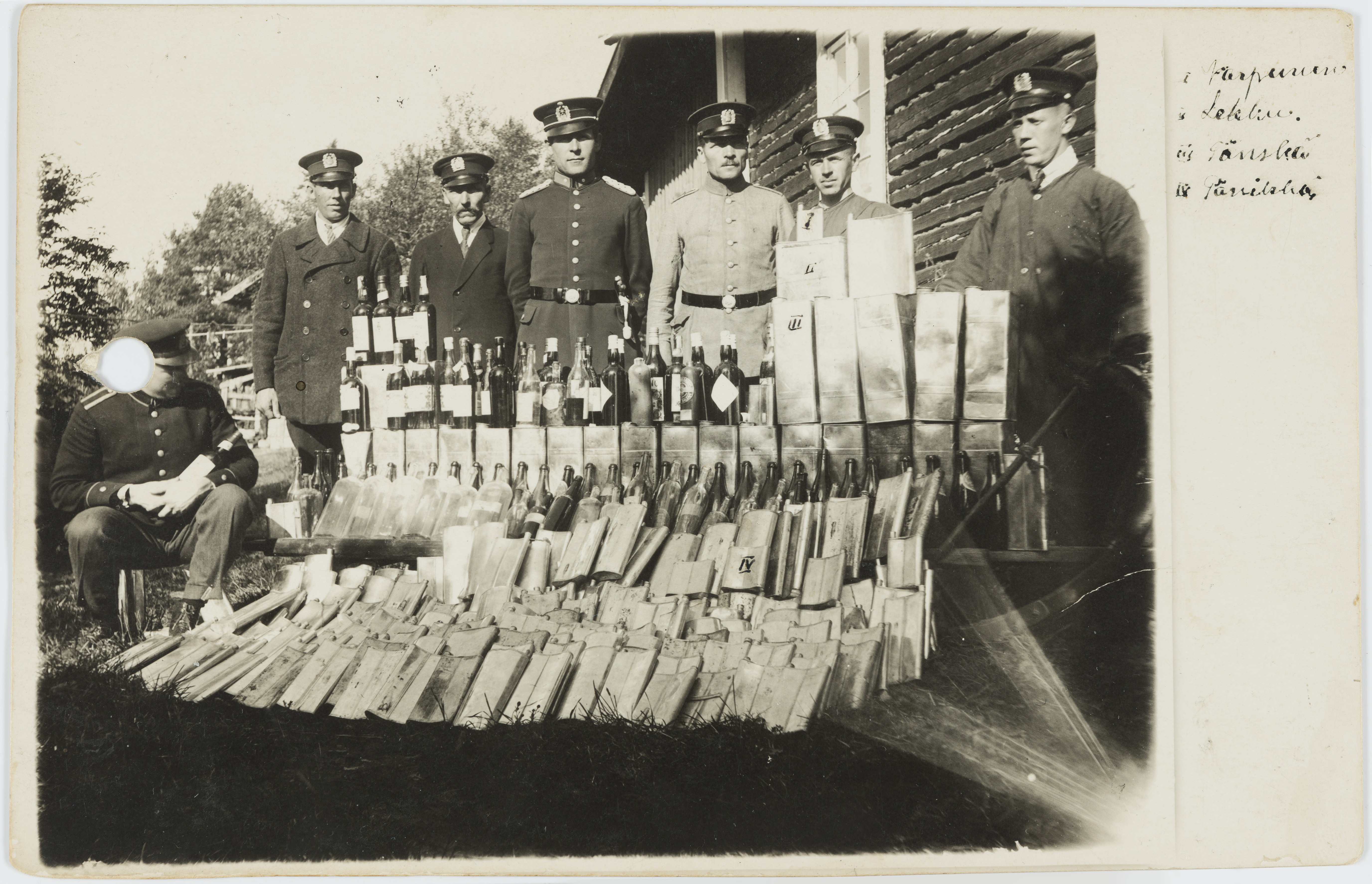 salakuljettajilta kieltolain aikana takavarikoitua alkoholia; vaaka, mustavalkoinen